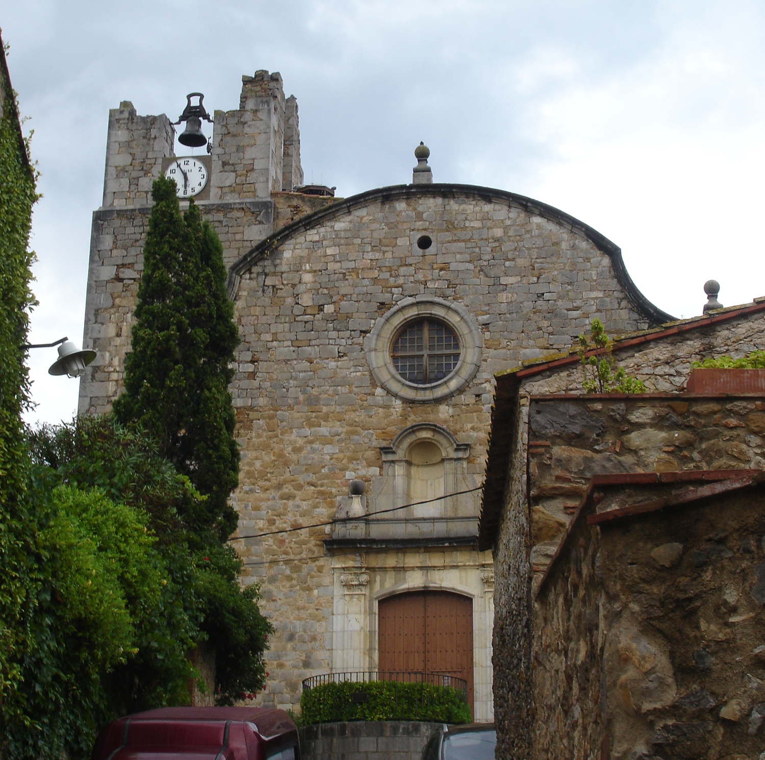 Monestir de Santa Maria d'Ullà (Girona, Catalunya, Espanya)